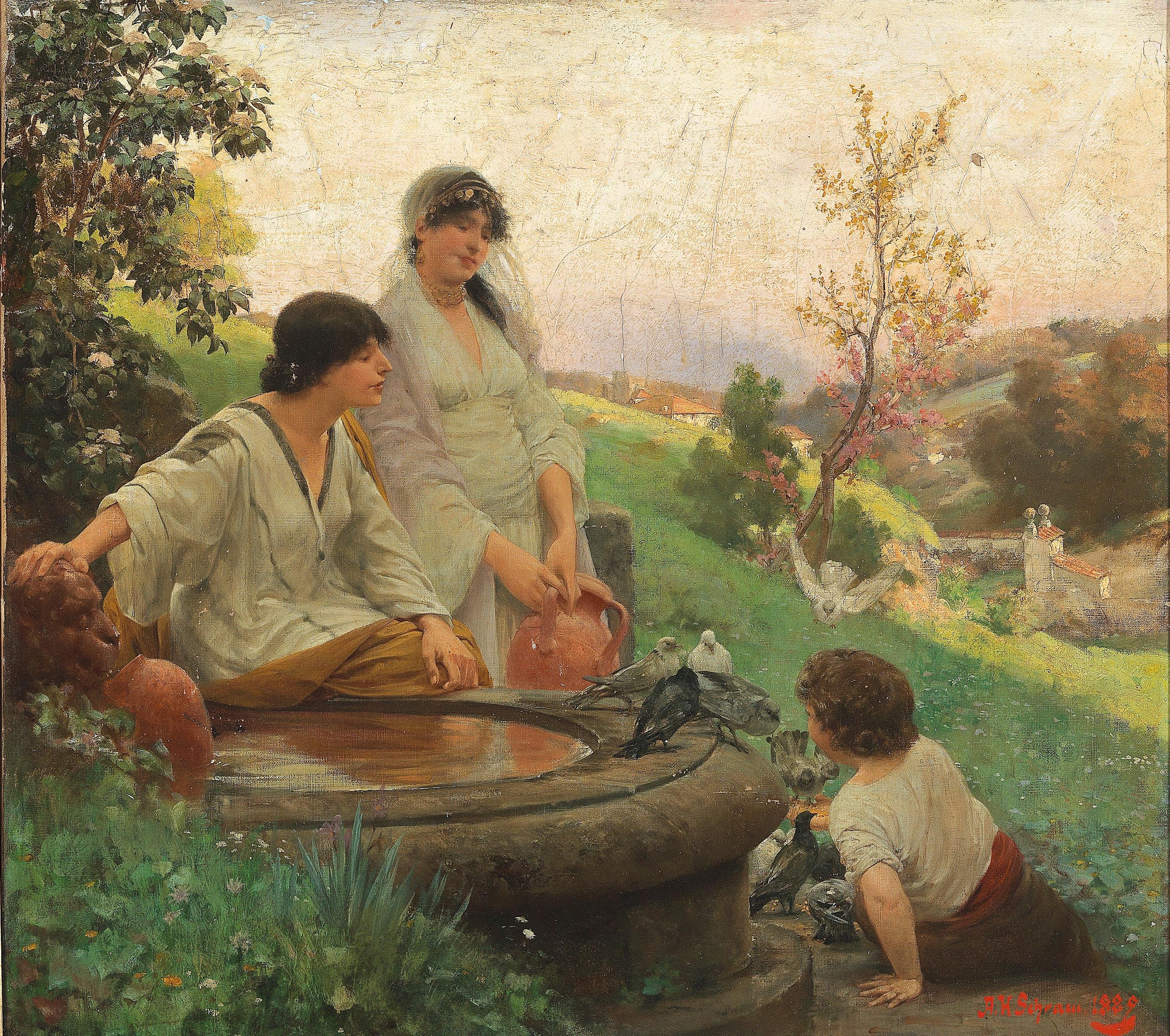 Am Brunnen, signiert, datiert A. H. Schram. 1889, Öl auf Leinwand, 62,5 x 68,5 cm